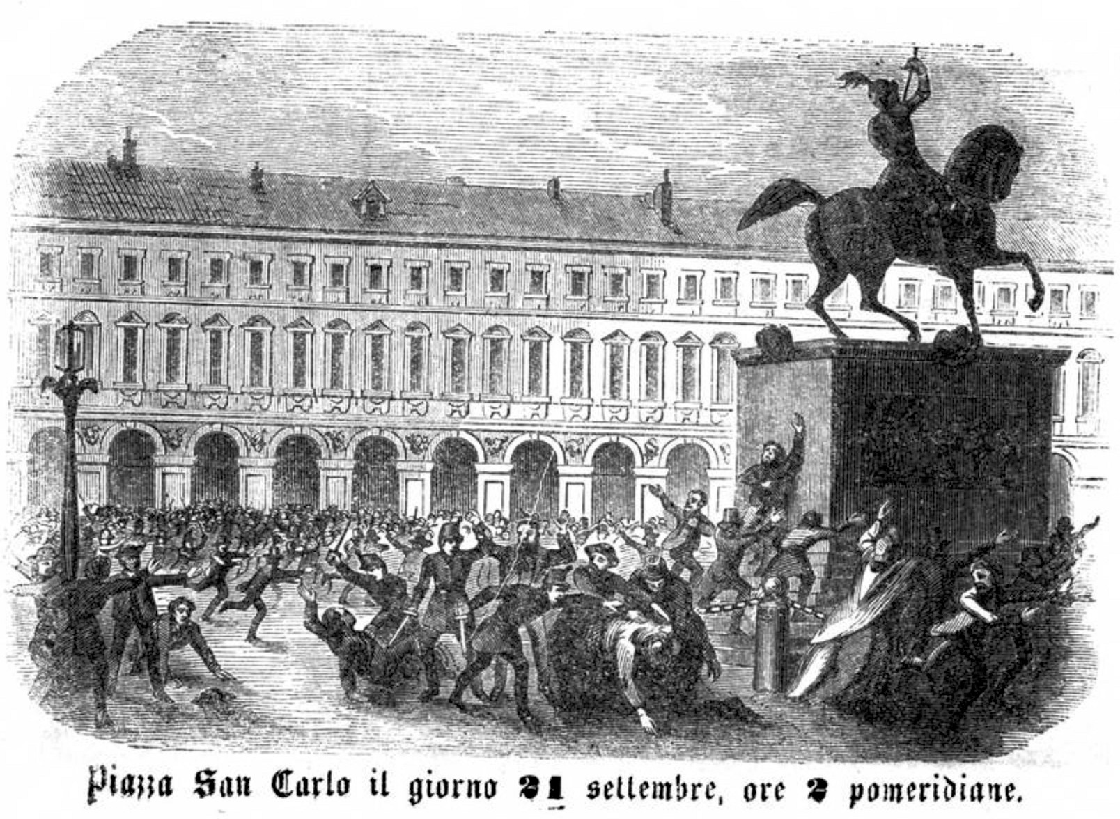 Torino - Piazza San Carlo il giorno 21 settembre, ore 2 pomeridiane